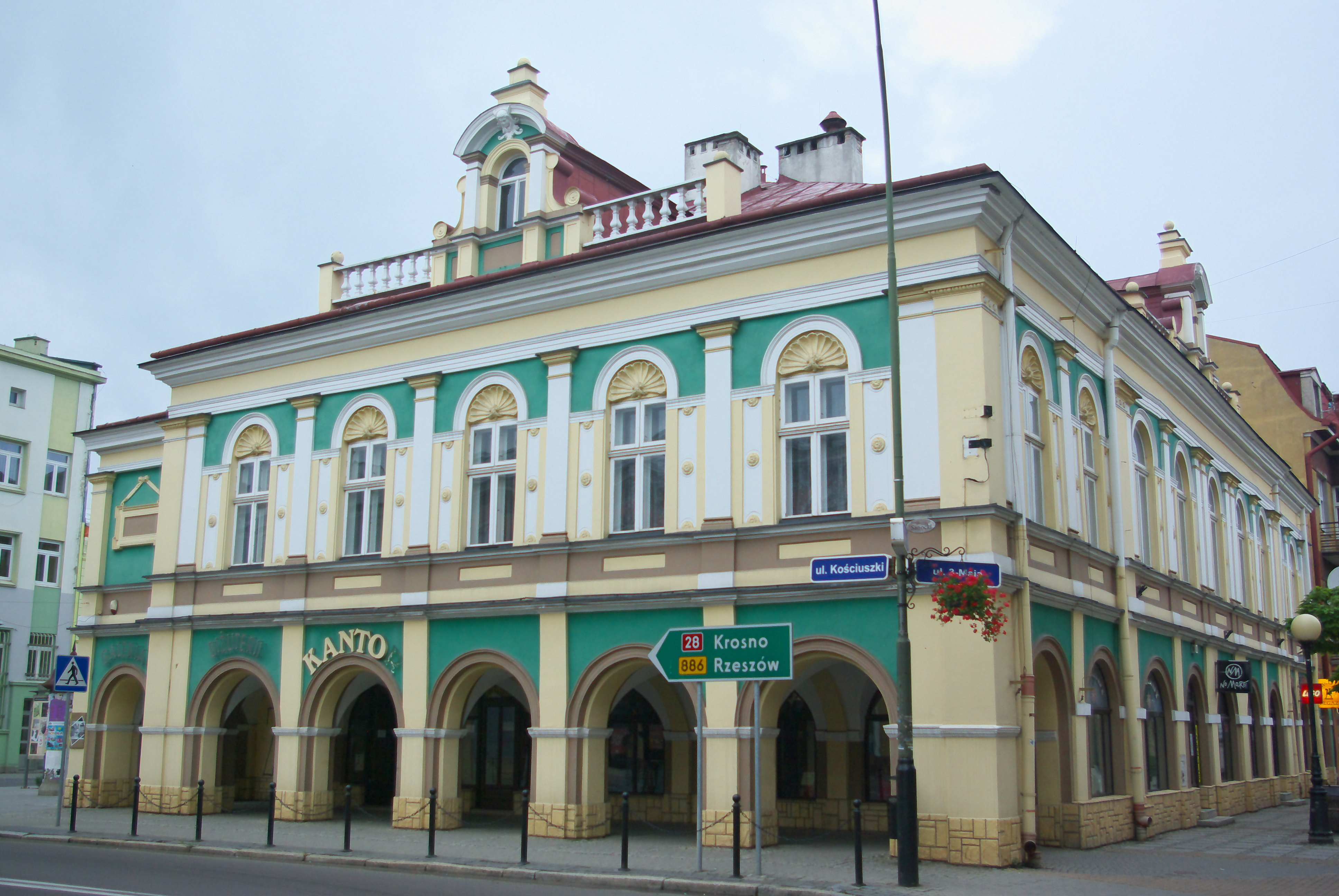 Kamienica przy ulicy Grzegorza z Sanoka 2 w Sanoku